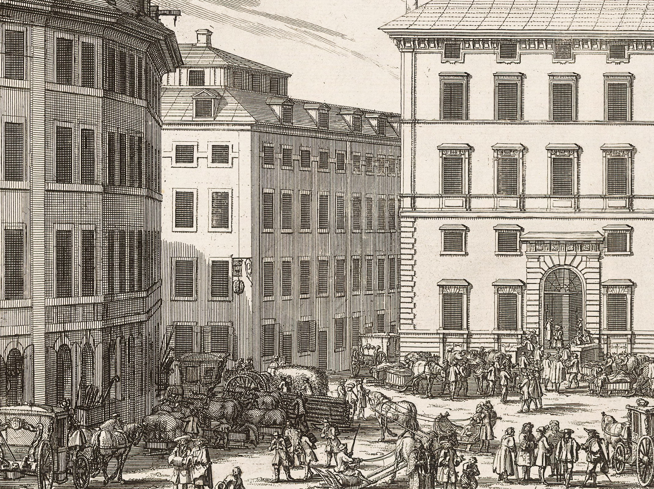 Alardiska huset vid Järntorget, del av Erik Dahlbergs illustration över Södra Bankohuset 1691